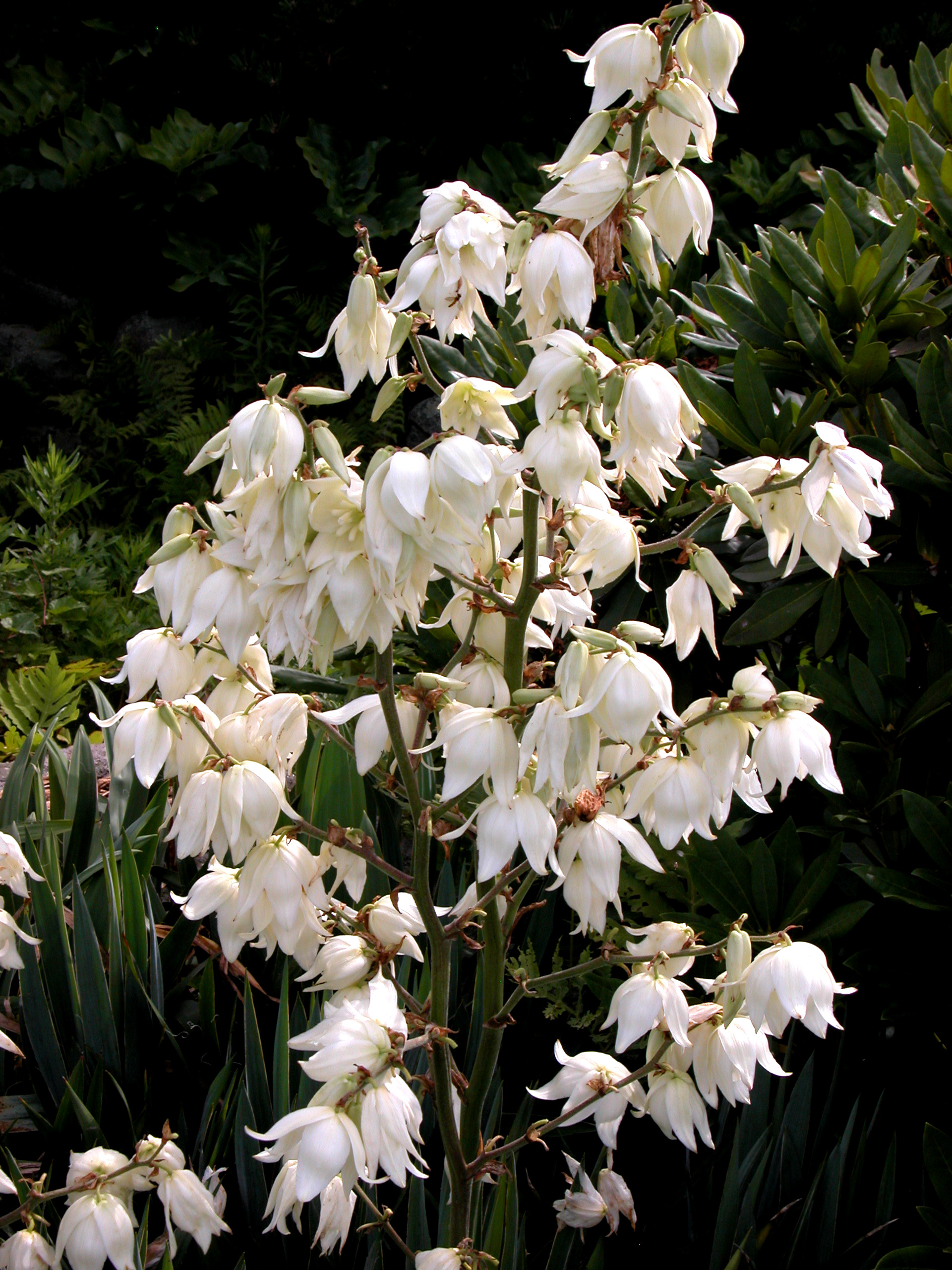 Yucca filamentosa